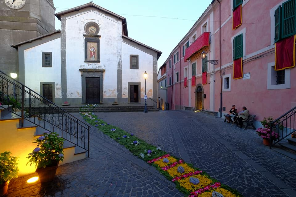 Sugestiva foto di notte di piazza San Clemente del Comune di Latera